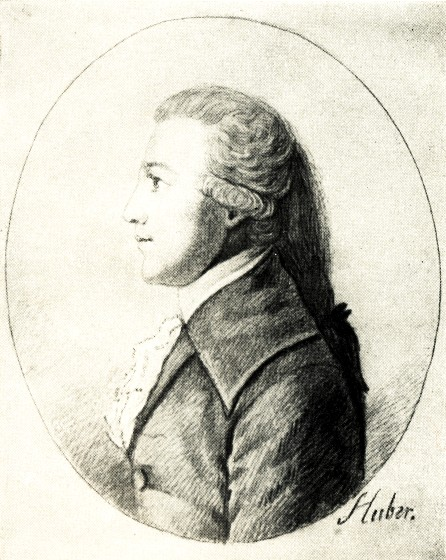 Silberstiftzeichnung